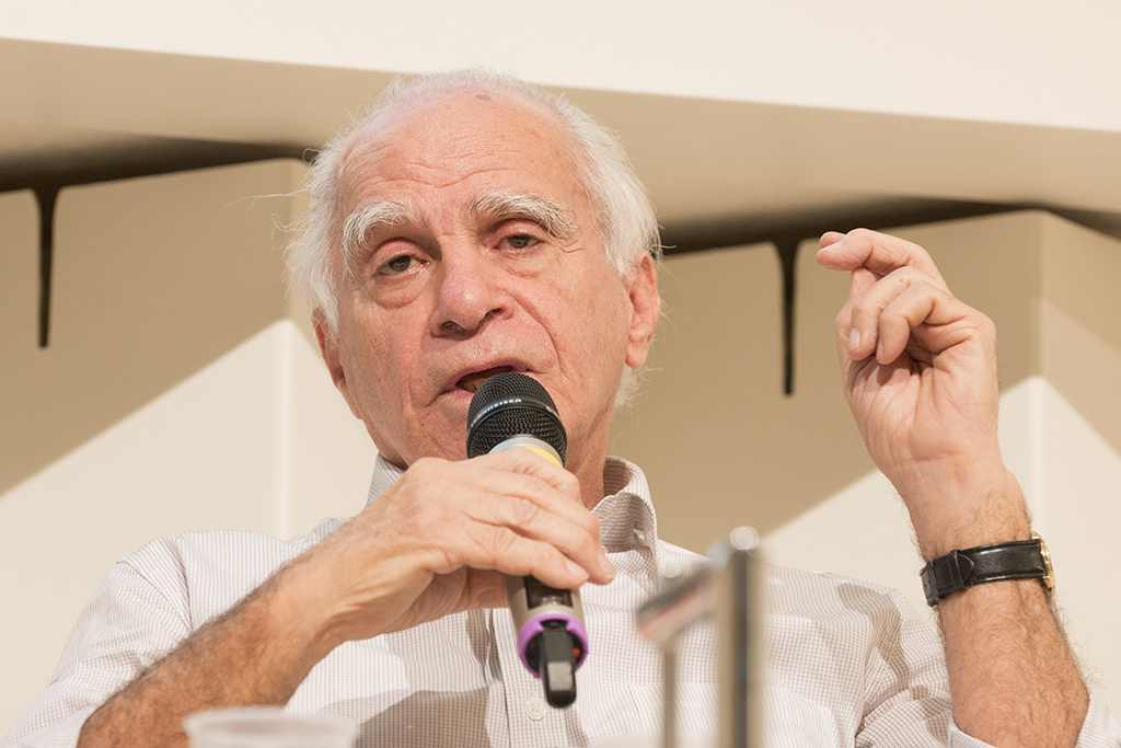 Alemanha | A participação do Brasil na Feira de Frankfurt se deu por meio dos ministérios da Cultura e Relações Exteriores, FBN, Fundação Nacional de Artes (Funarte), Câmara Brasileira do Livro, com apoio da Embratur, Agência Brasileira de Promoção de Exportações e Investimentos (Apex-Brasil) e Sesc São Paulo. bit.ly/1clVotx Foto: Johan Visbeek